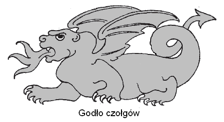 Godło czołgów Wojska Polskiego II RP